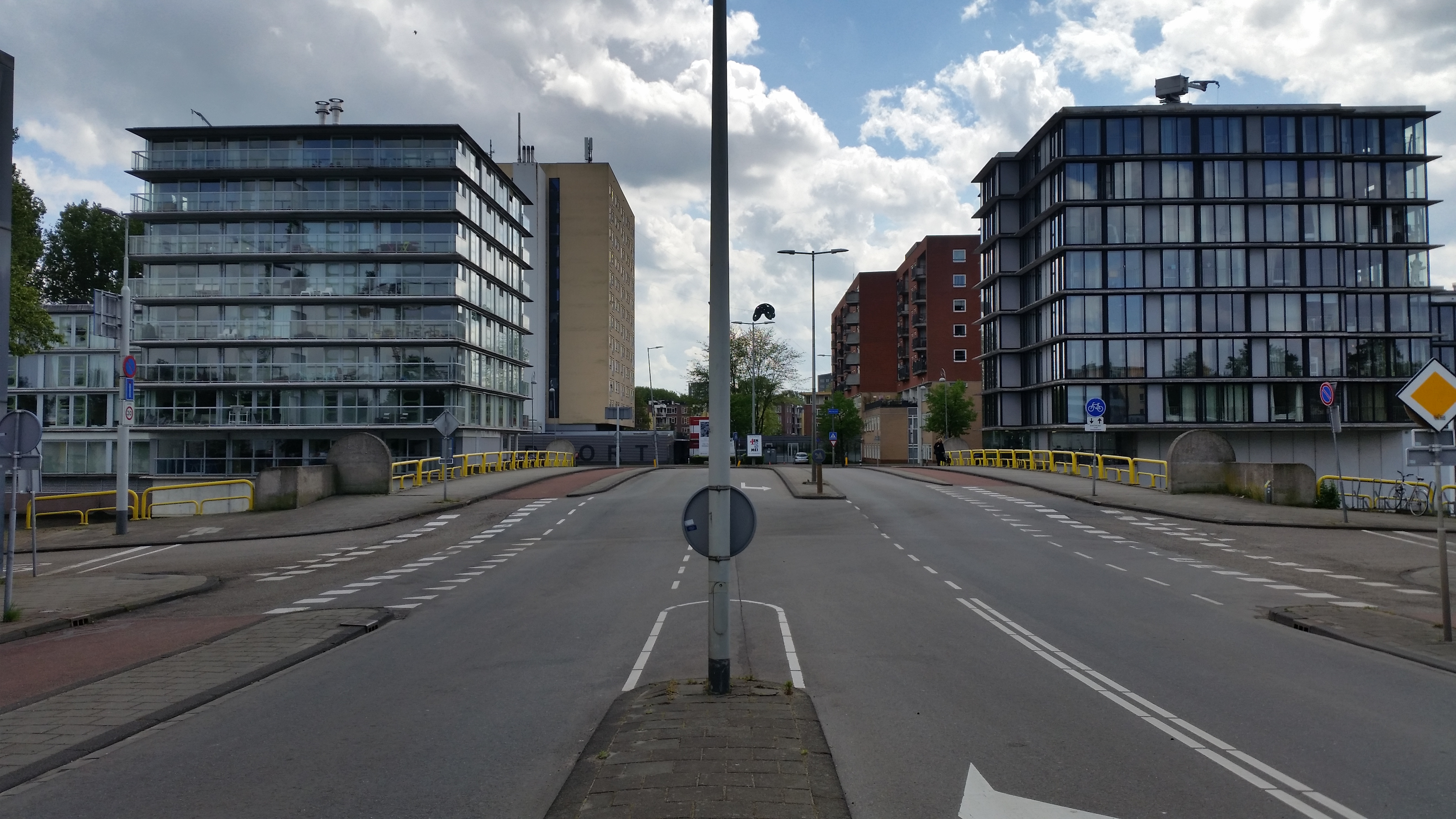 Impressie van Brug 1916 nadat zij in april 2020 haar naam had gekregen Johan Rädeckerbrug, Amsterdam-Centrum